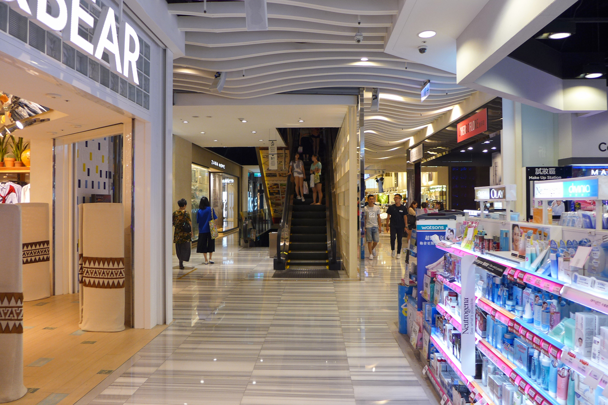 ATT 4 FUN Level 1